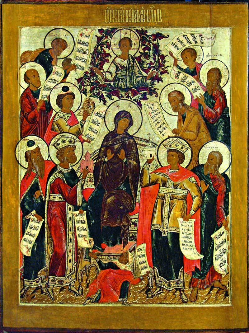 Похвала Богоматери. Первая половина XVII в. 127×98 см. Ярославский художественный музей, Ярославль, Россия. Инв. И-664. Происхождение не установлено. Поступила в музей до 1951 г. Реставрировалась в 2002 г. Л. Д. Рыбцевой.